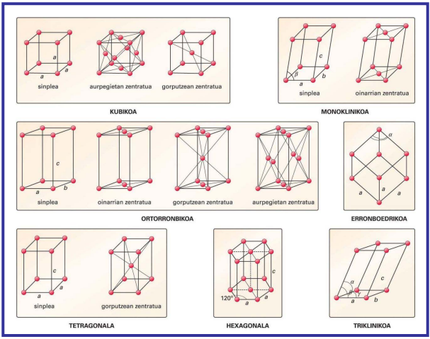 Bravais-en gelaxkak